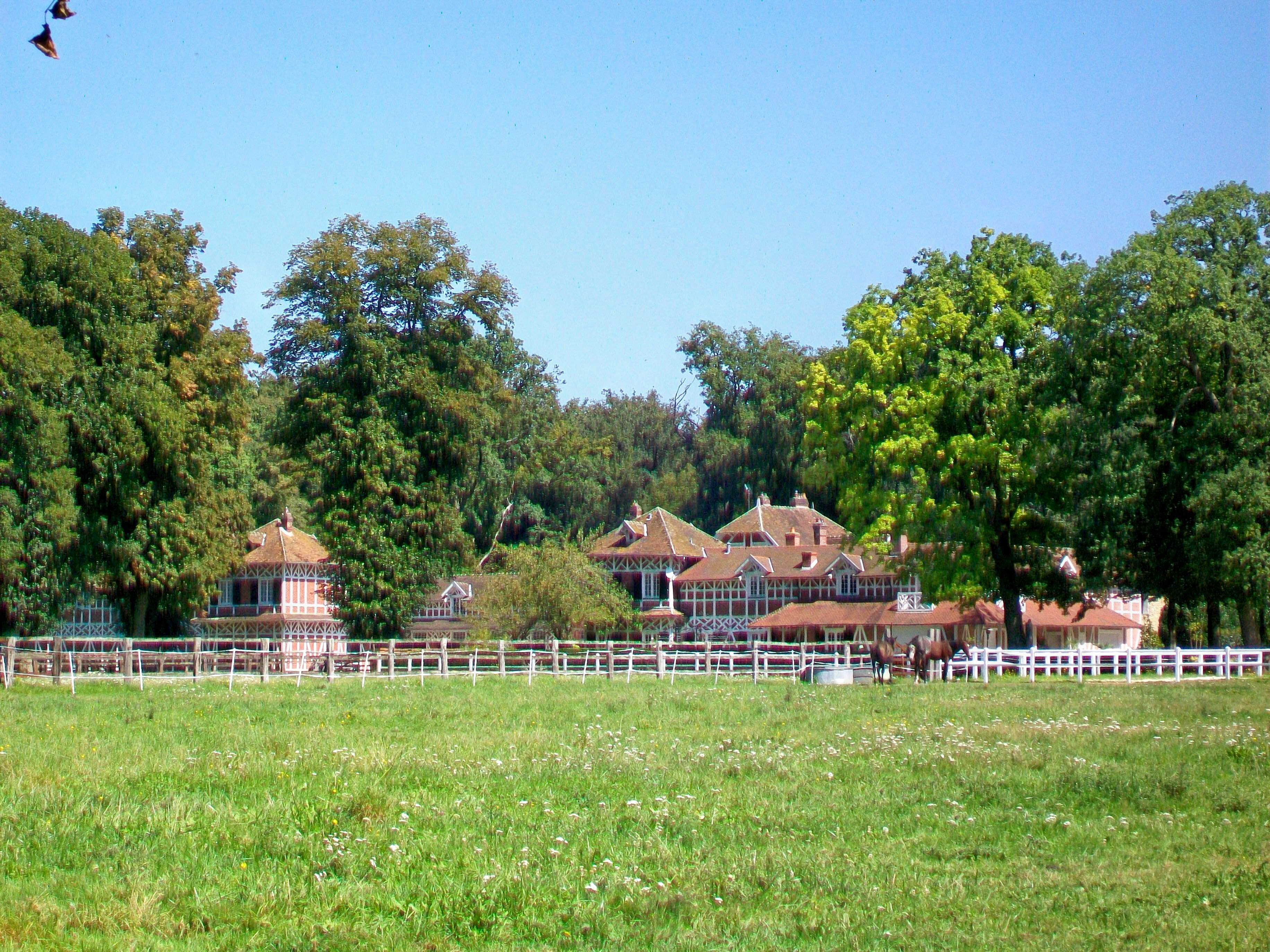 Le haras de Plaisance, au hameau du Plessis-Chamant, à la lisière sud de la forêt d'Halatte.